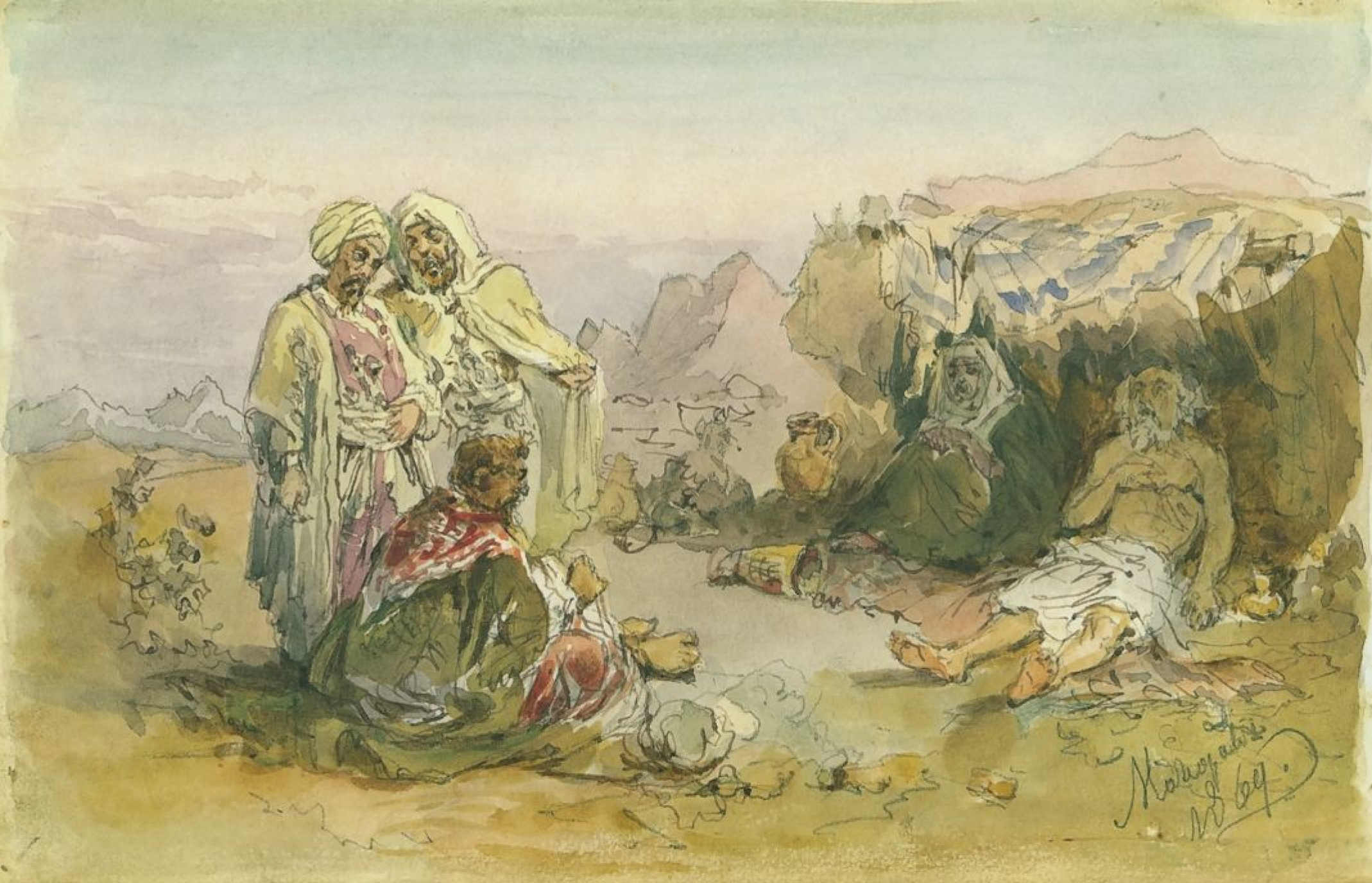 Job et ses amis. Aquarelle sur papier du peintre russe Ievgueni Makarov. 1869. 17 x 11 cm Collection privée